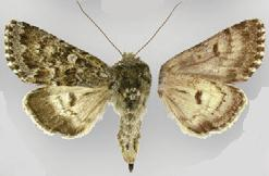 Lasionycta poca female